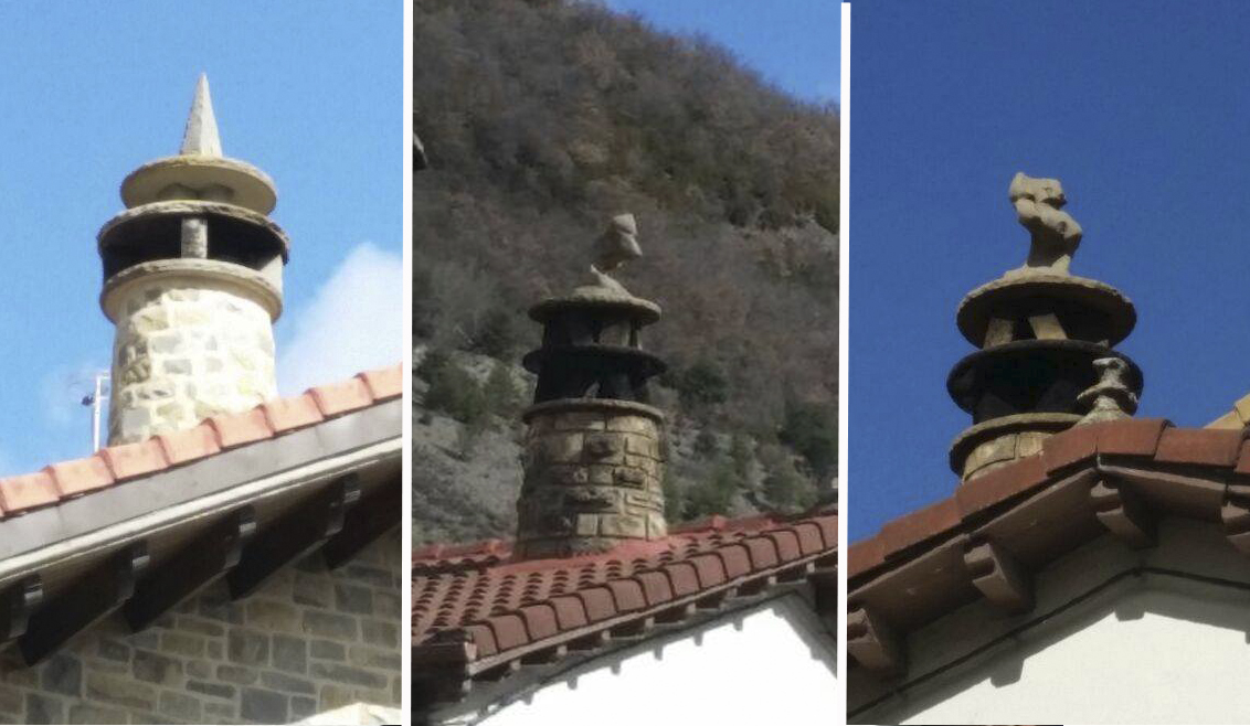 Ejemplos de chimeneas con espantabrujas en Biescas